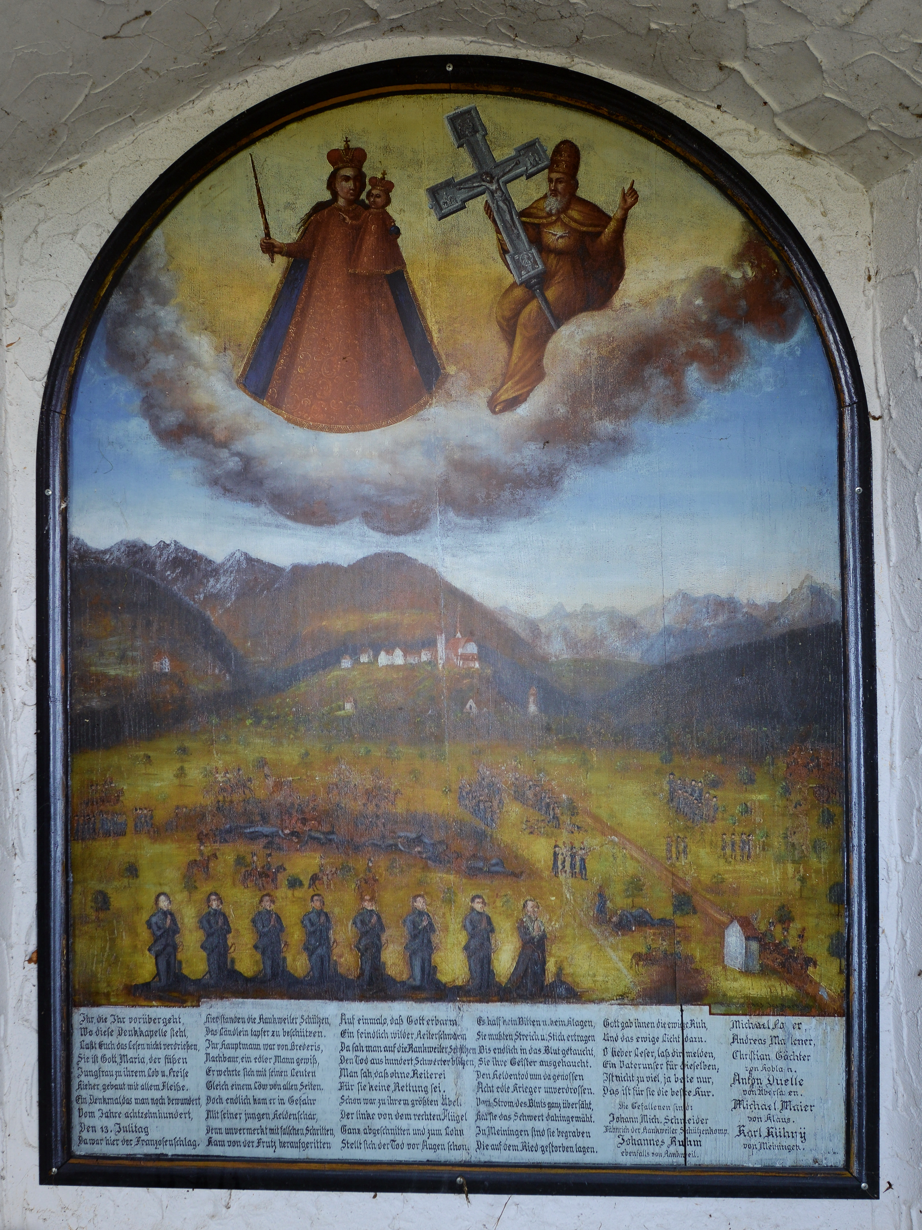 Riedkapelle an der Riedstrasse, in Rankweil bei Feldkirch in Vorarlberg.